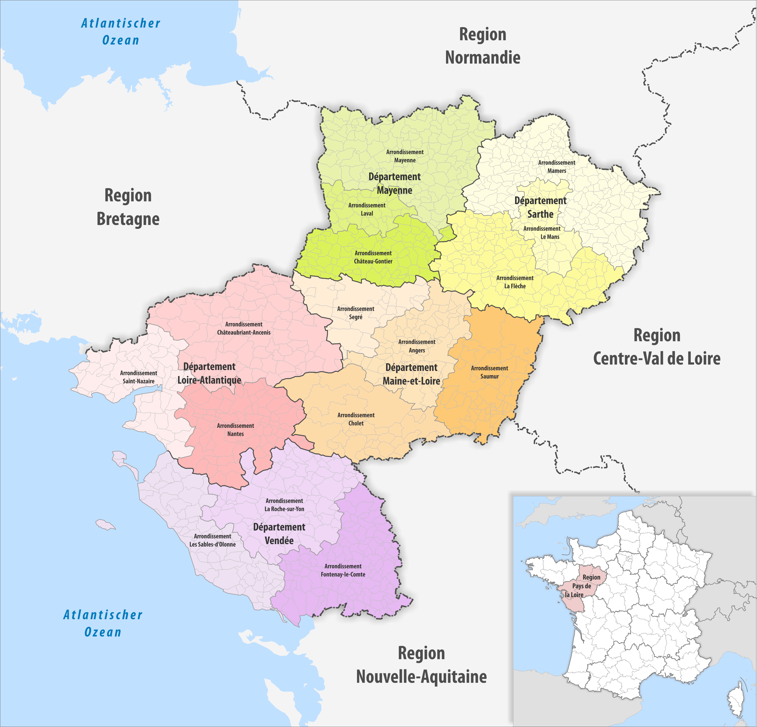 Gemeinden, Arrondissemente und Departemente in der Region Pays de la Loire